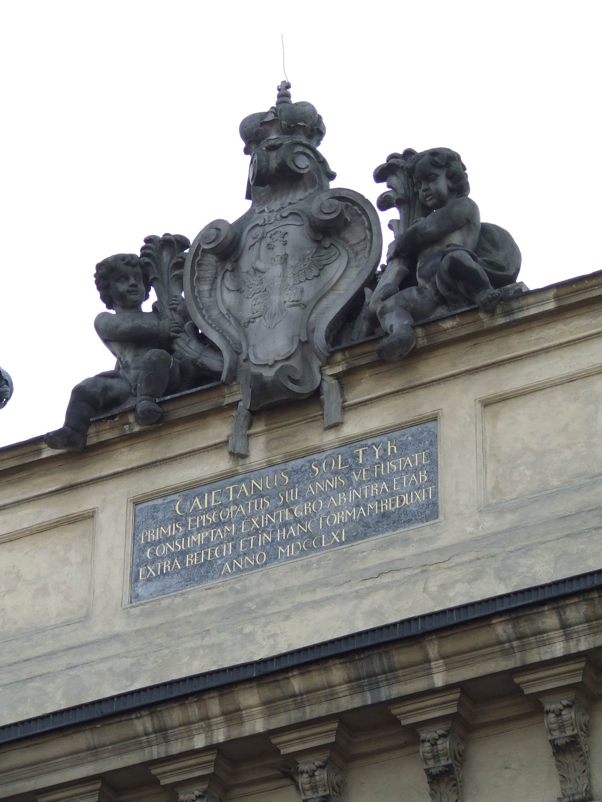 Pałac Biskupów Krakowskich, Warszawa, ul. Miodowa